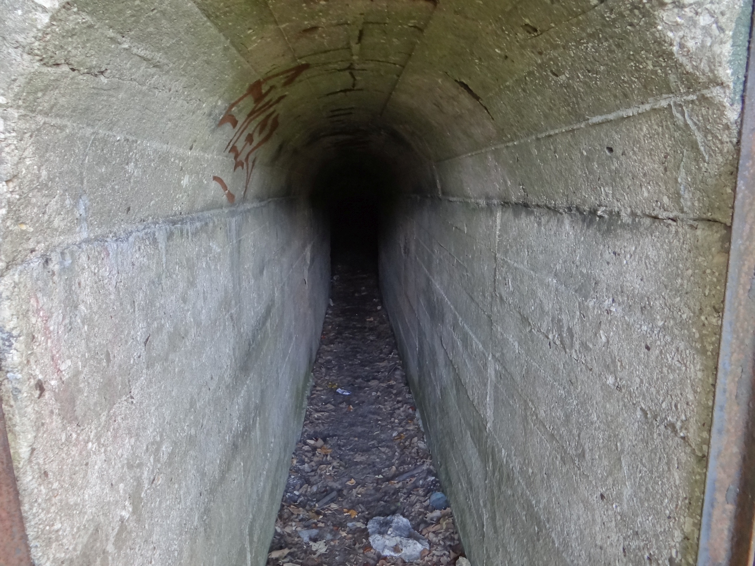 Kawerna na wzgórzu Wielkanoc (osiedle Bodzów) w Krakowie